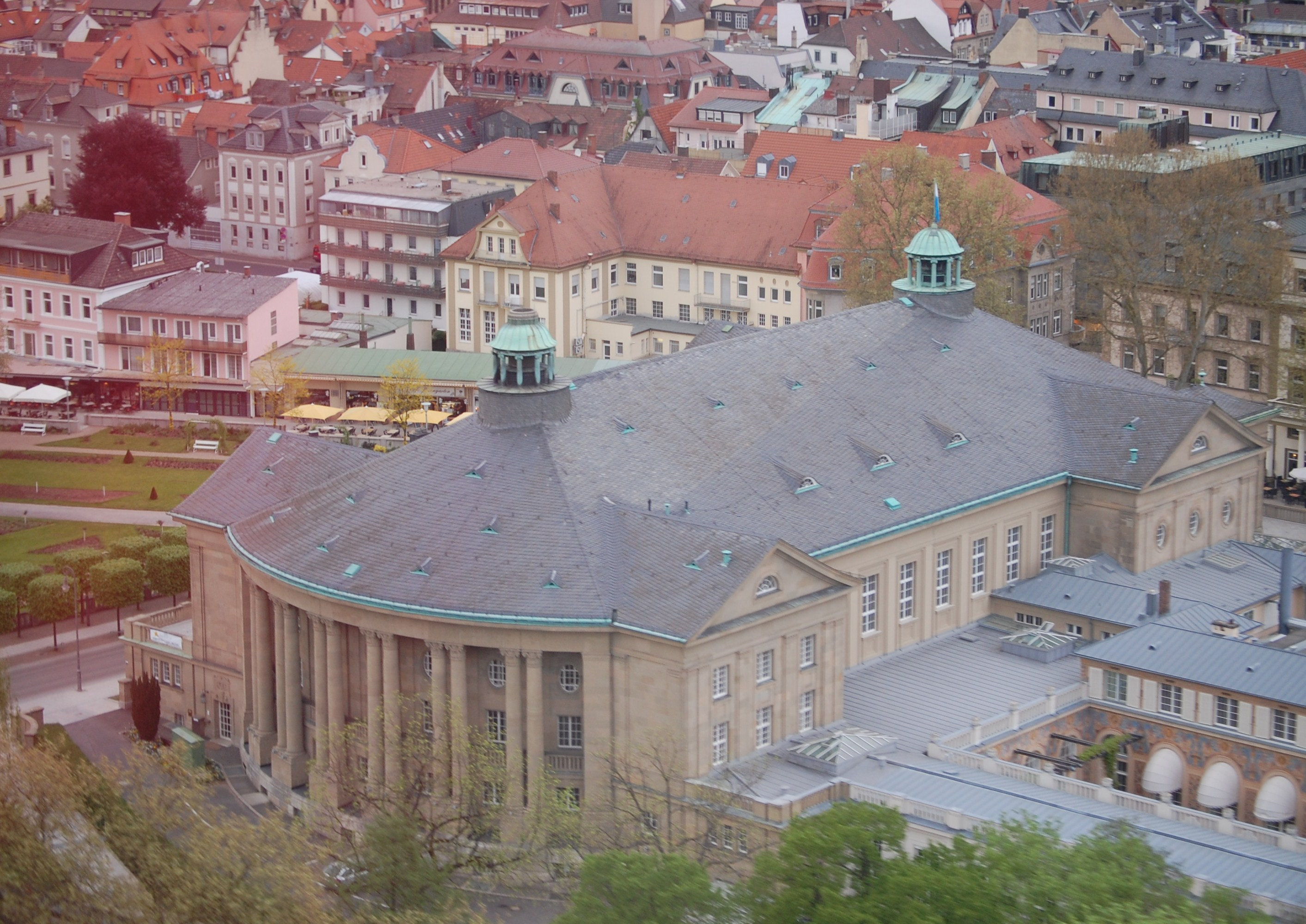 Regentenbau in Bad Kissingen mit Schmuckhof (Innenhof, rechts) und Rosengarten (links)